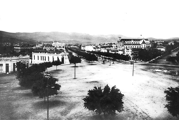 Avenida Afonso Pena,em Bel oHorizonte, em 1900.